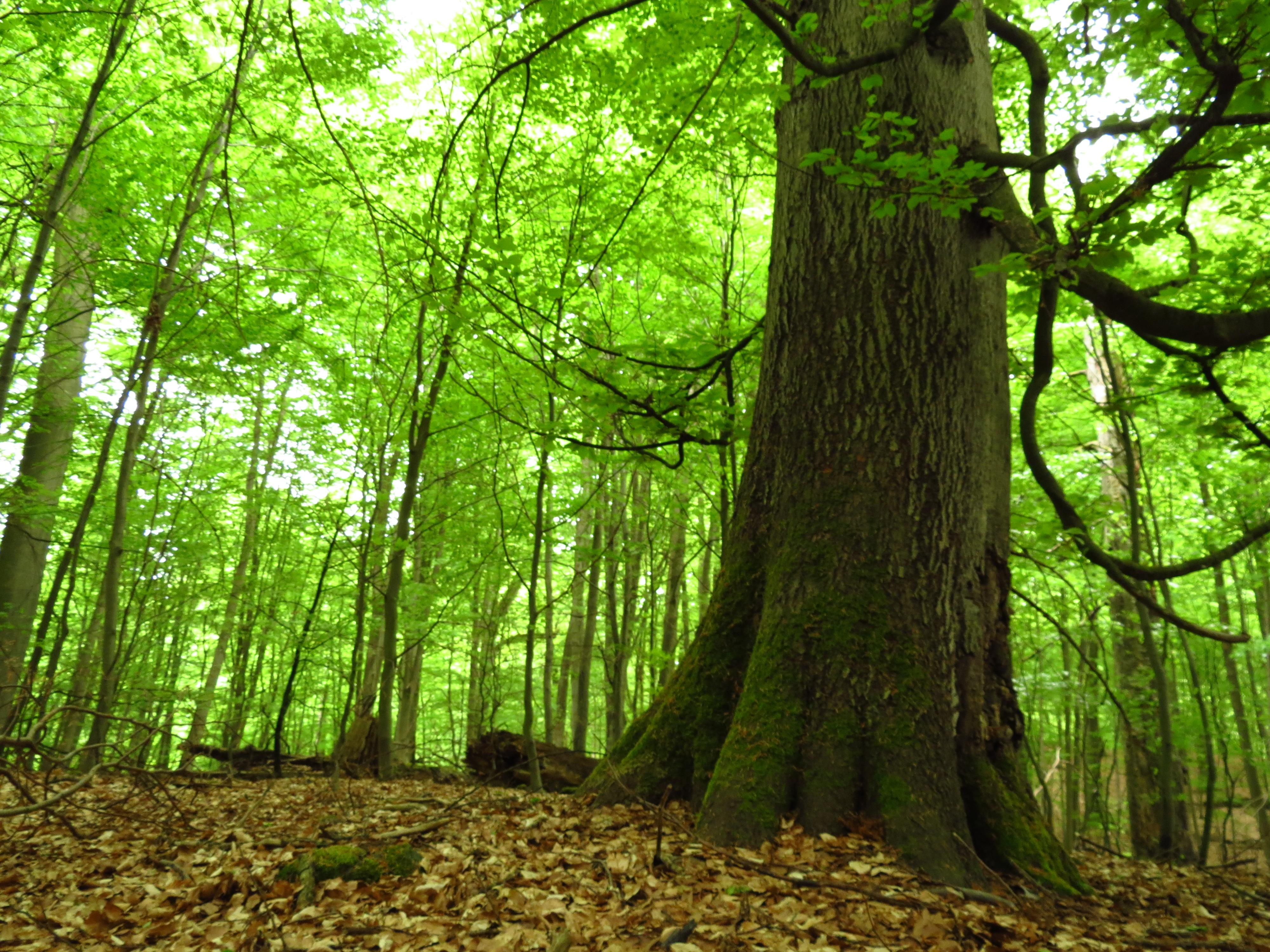 Alte Buche im Naturschutzgebiet "Heilige Hallen" in Mecklenburg-Vorpommern.